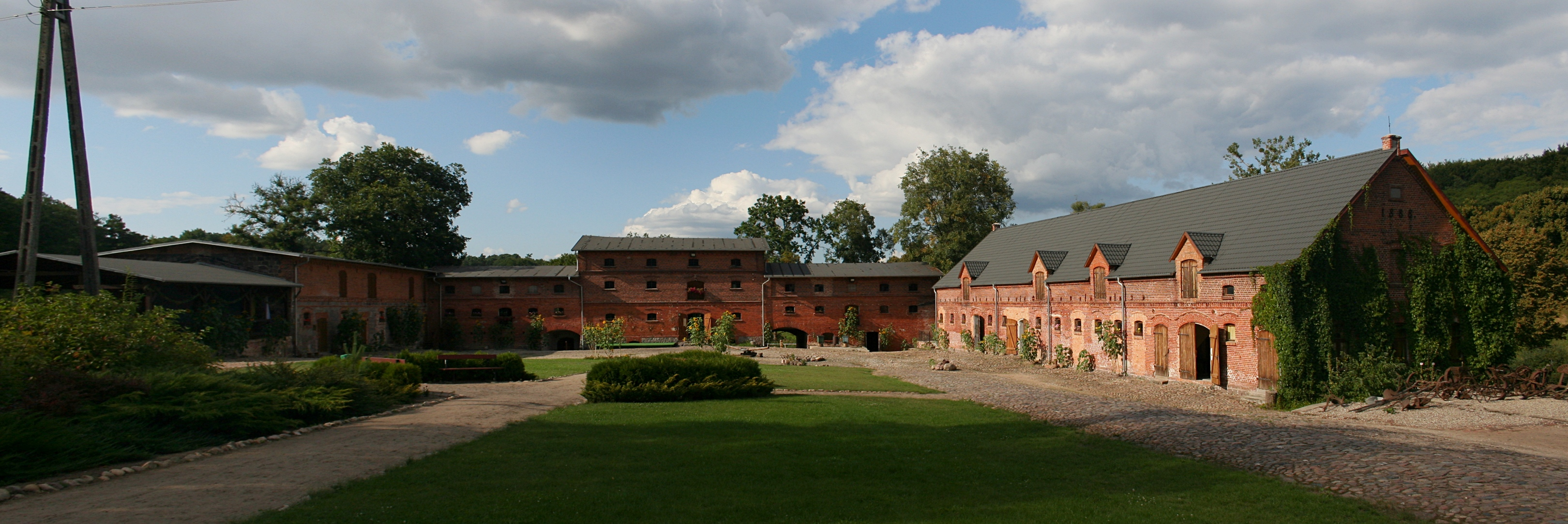 Mniszki. Folwark, 1863-1915